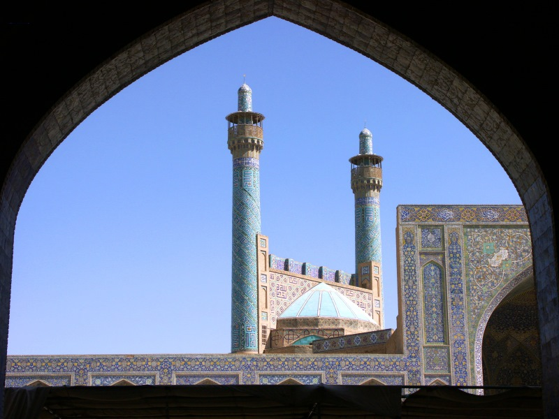 Moschee am Imanplatz